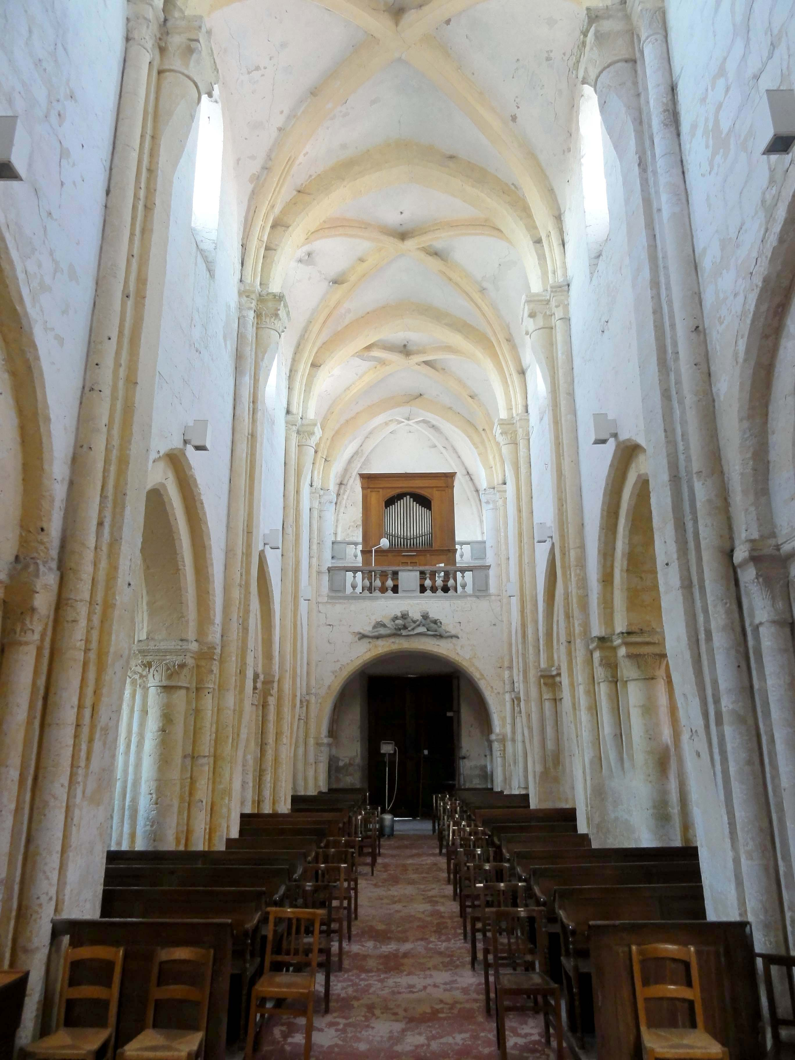 Intérieur de l'église - voir titre.